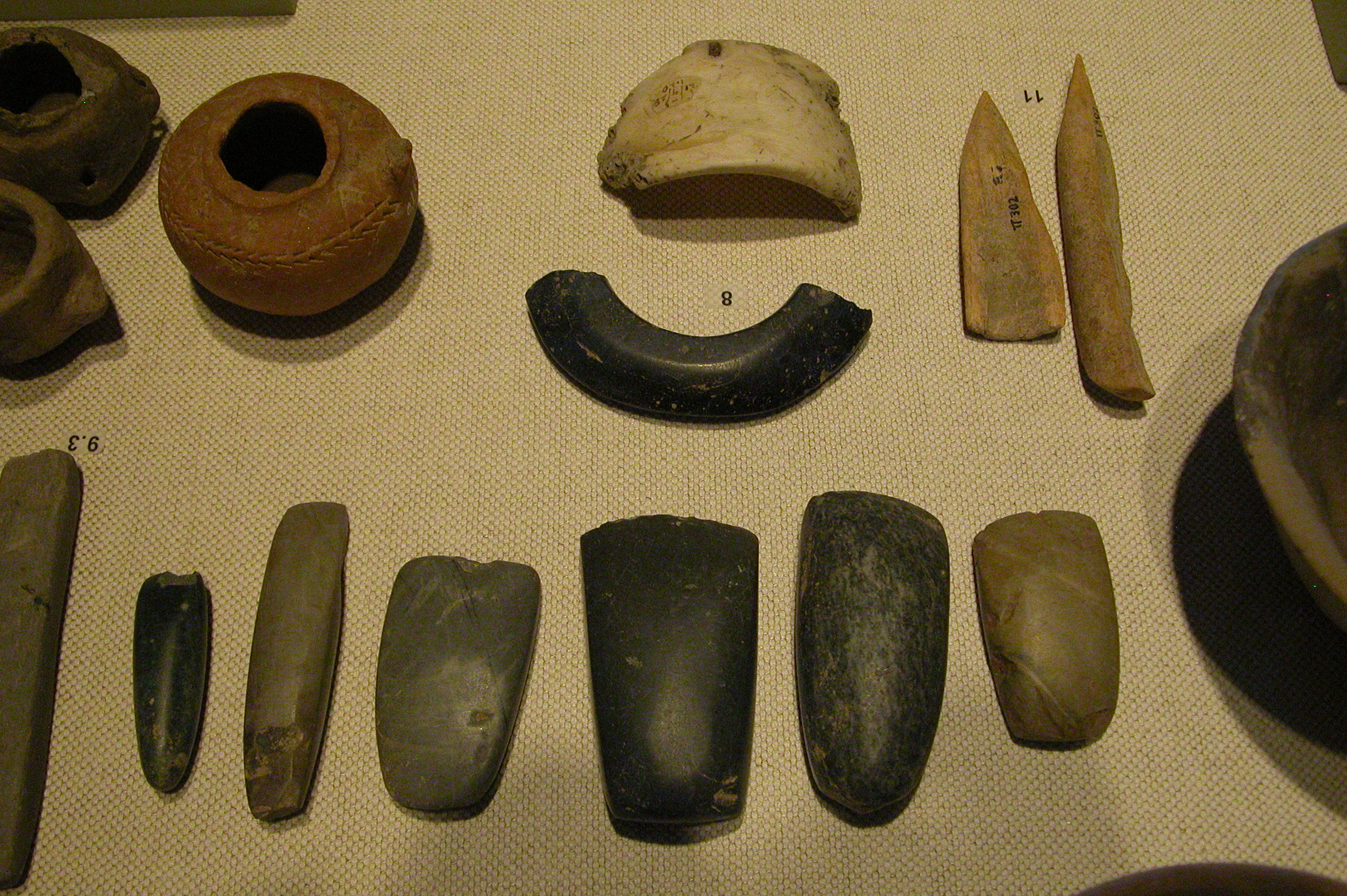 Photographie d'objets du néolithique. Notamment un morceau de bracelet (8), des affûteurs (9.3), et des aiguilles en os (11), des couteaux et des haches (au premier plan).